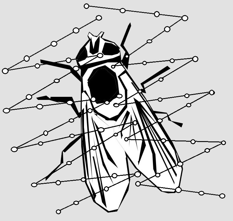 Schematische Darstellung einer durch Speispinnenleim (Scytodes thoracica) fixierten Diptera. Nach: Der Kosmos Spinnenführer von Heiko Bellmann